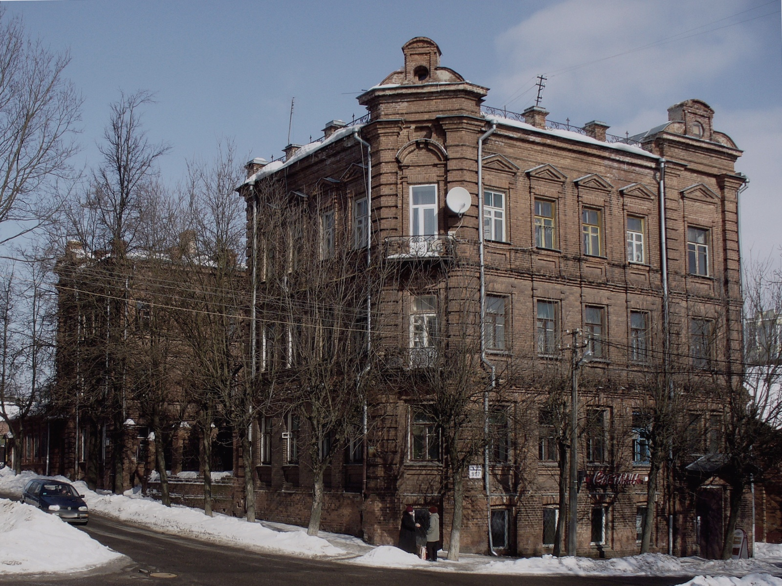 Бывшие доходные дома постройки конца 19 начала 20 века на ул. Суворова в Витебске.